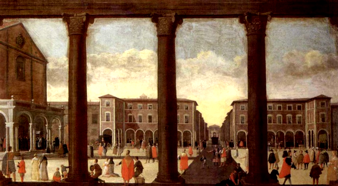 Veduta della Piazza del Duomo di Livorno